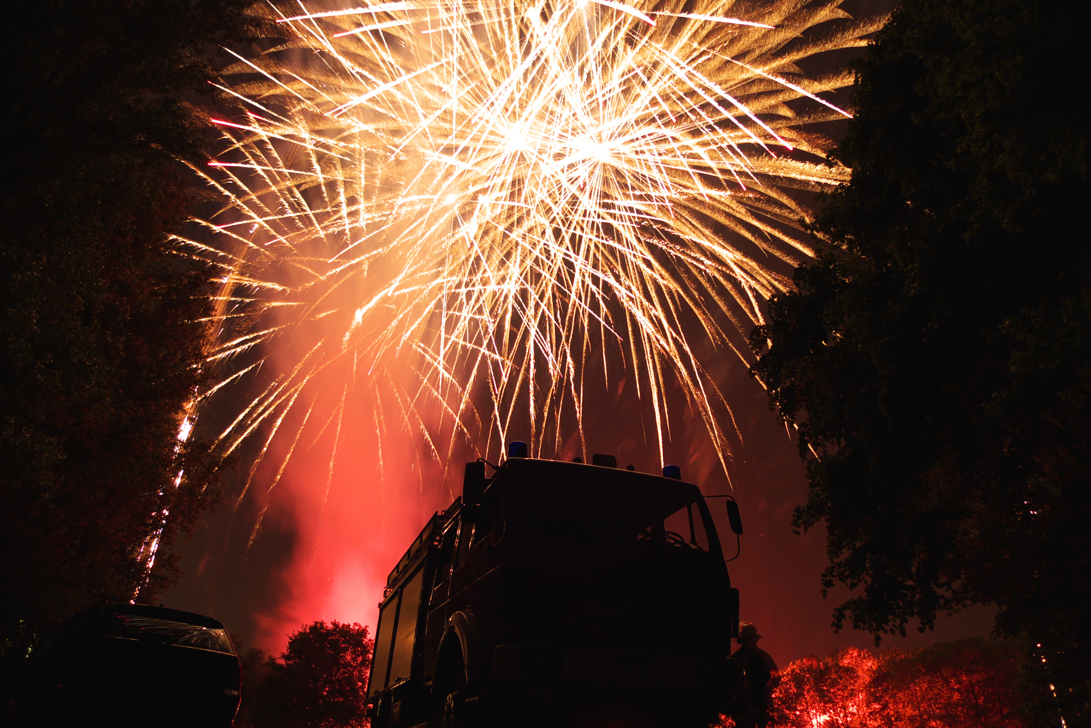 Eine Brandsicherheitswache begleitet das Abbrennen eines Großfeuerwerks.